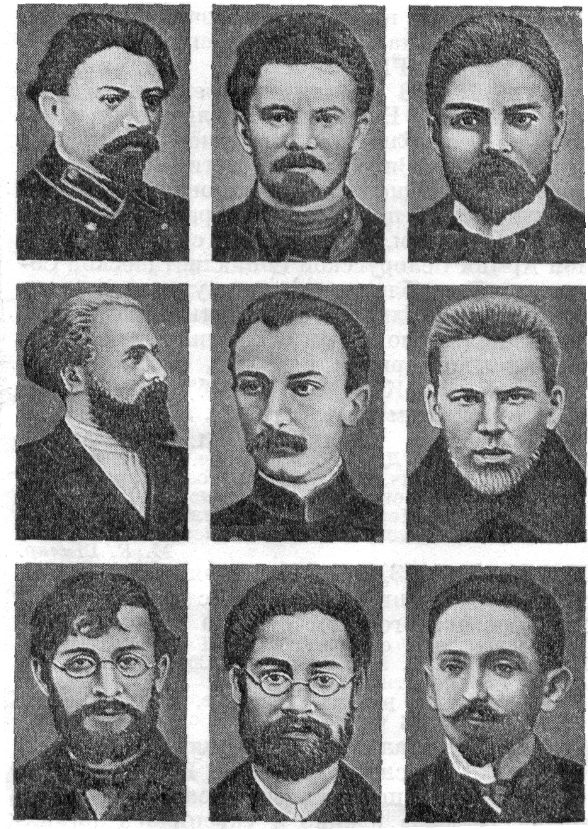 Members I congress in Minsk. A photo XIX-th century